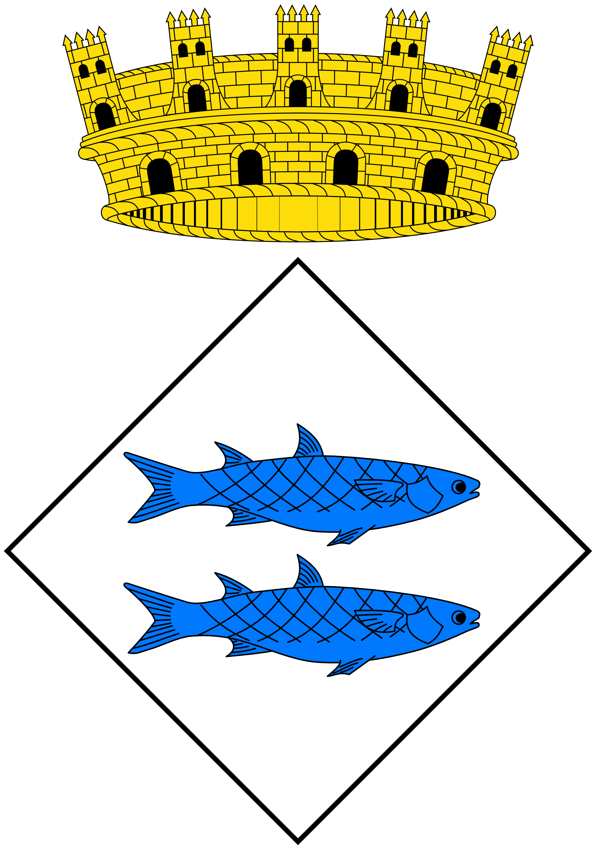 Escut de Lliçà de Vall